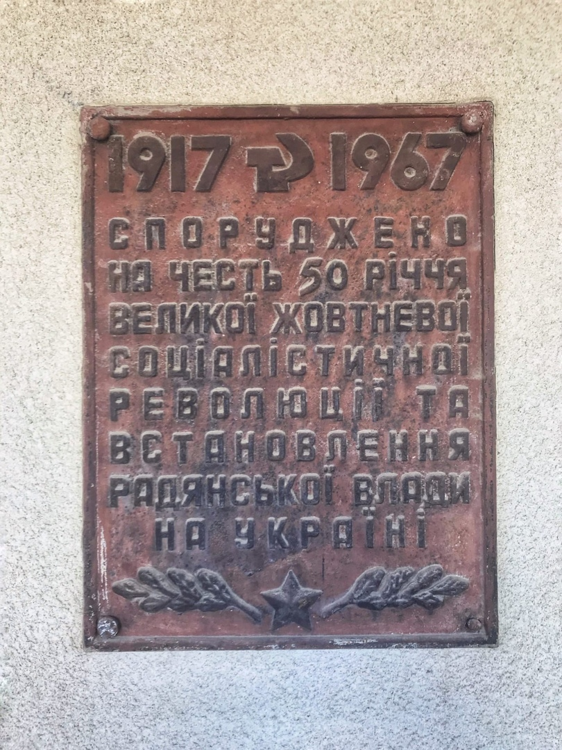 Дом Культуры